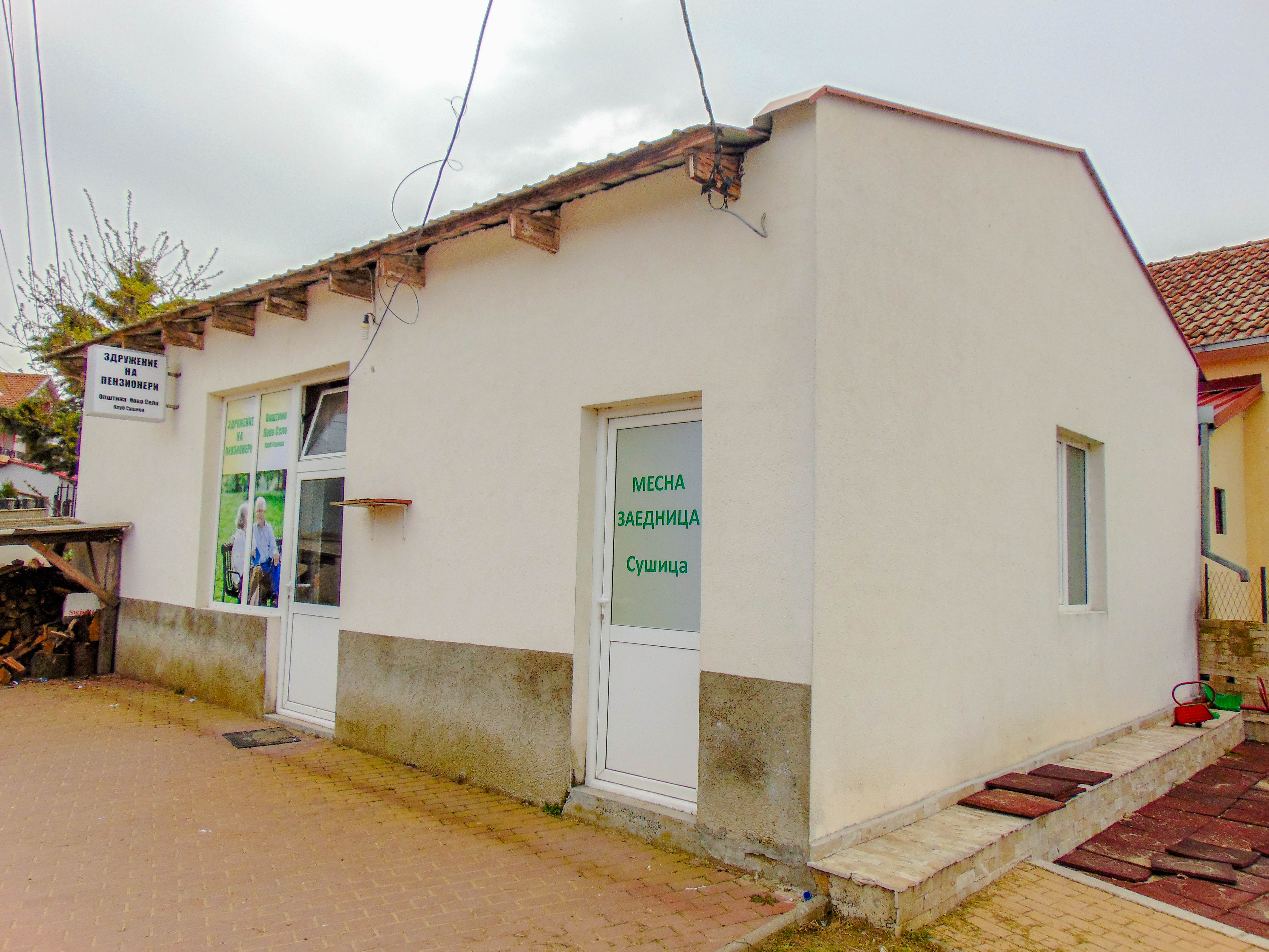 Дом на пензионери - Сушица